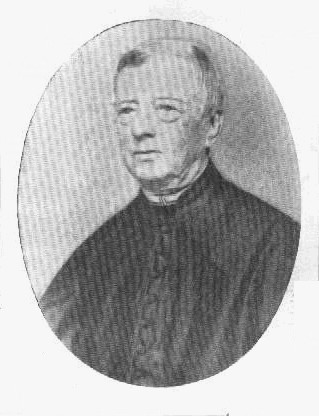 Jan Pleskač (1797-1873), český farář, buditel